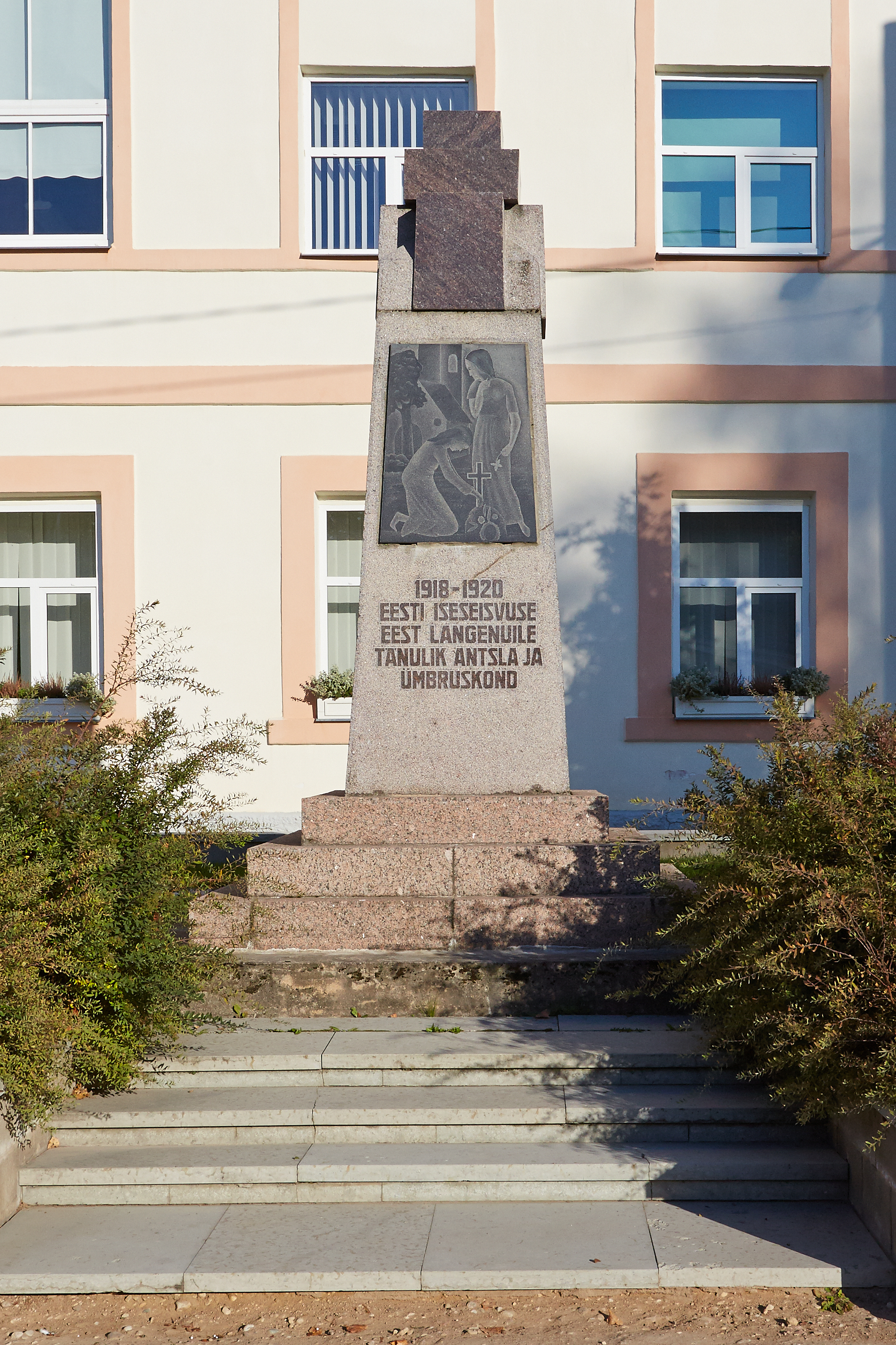 Vabadussõja mälestussammas Antslas